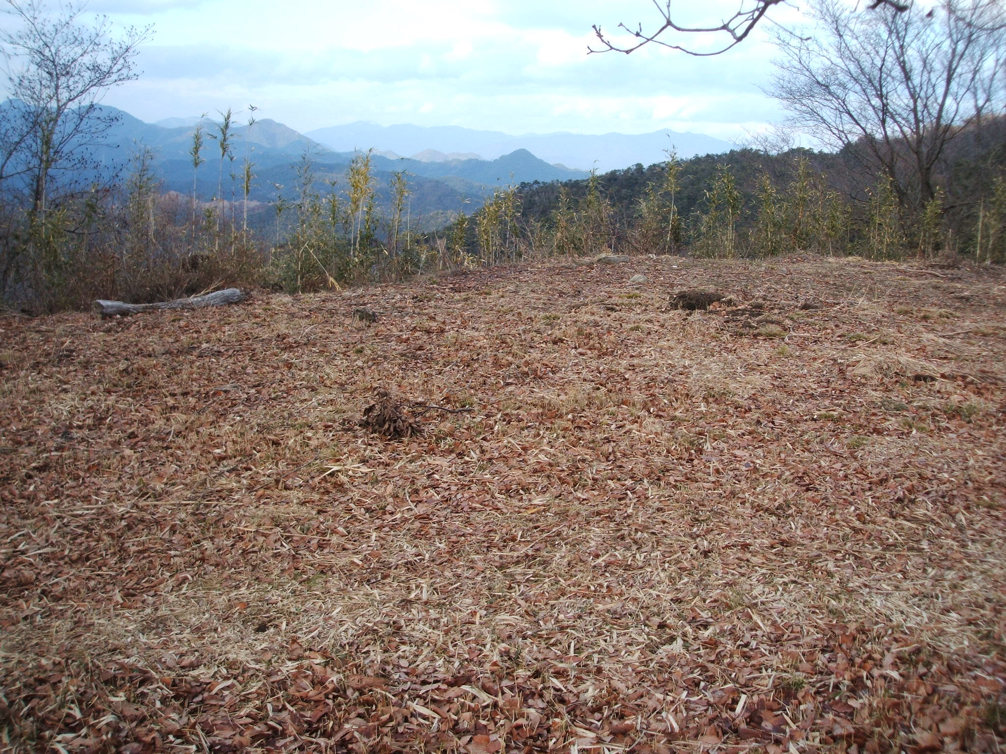 本丸跡（城山頂部の削平面）